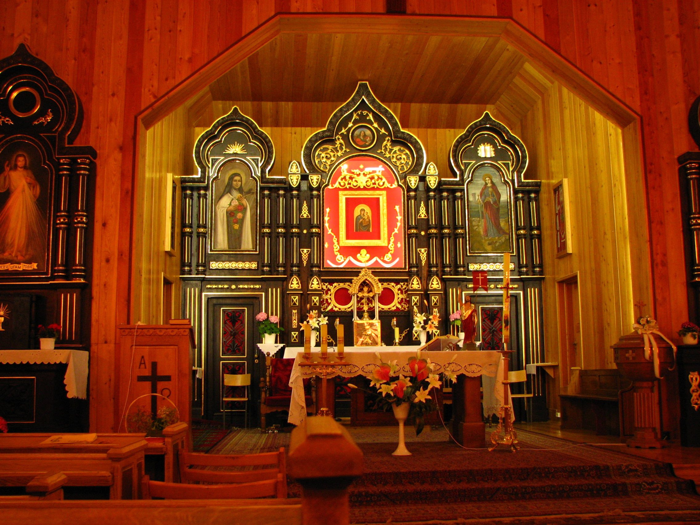 Ołtarz główny dawnej cerkwi prawosławnej, obecnie kościoła rzymskokatolickiego w Horbowie koło Białej Podlaskiej (zabytek nr rejestr. A-229 z 13.10.1993)